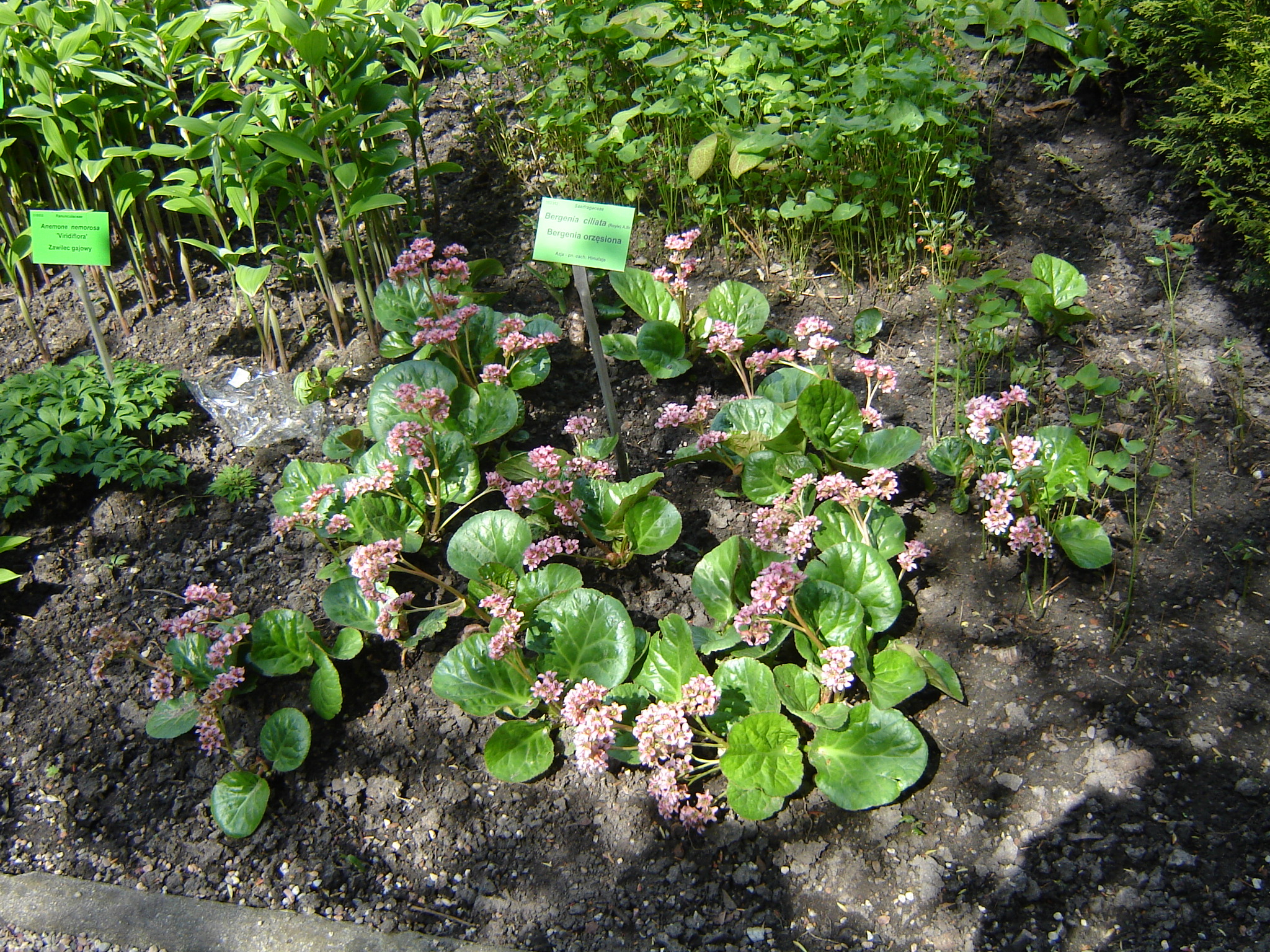 bergenia ciliata in "Wrocławskie ogrody botaniczne"